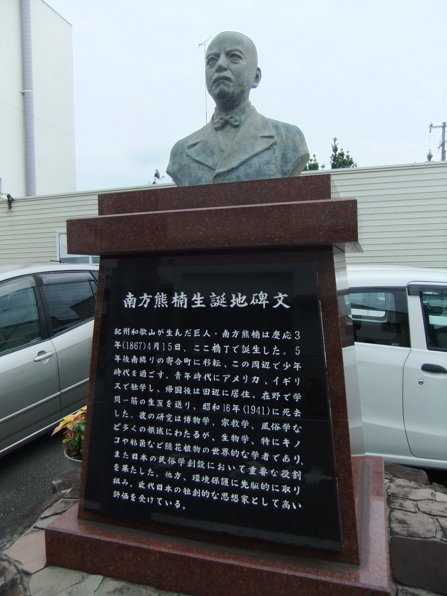 和歌山市橋丁。生誕の地に建つ、南方熊楠の胸像。